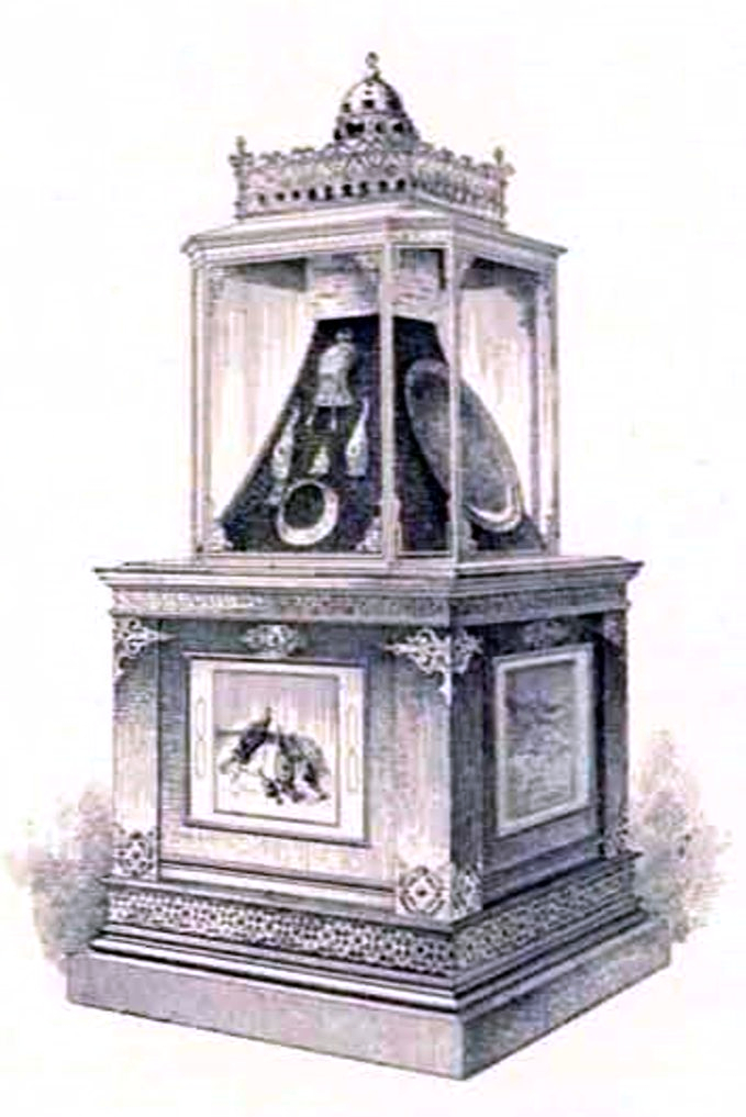 Vitrina Tezaurului de la Pietroasa de la Muzeul de Antichități din București